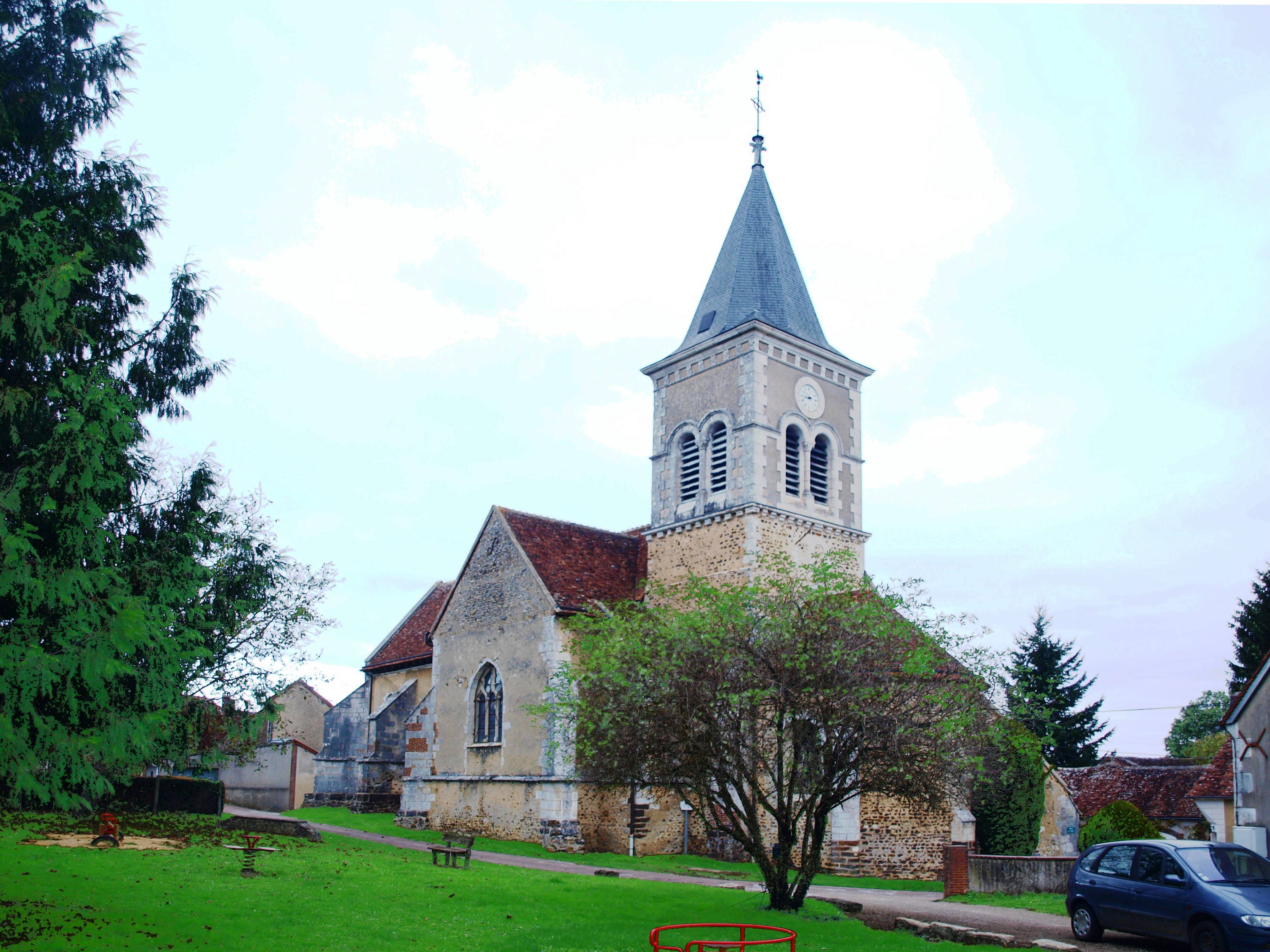 Fontaines (Yonne, France) , l'église.